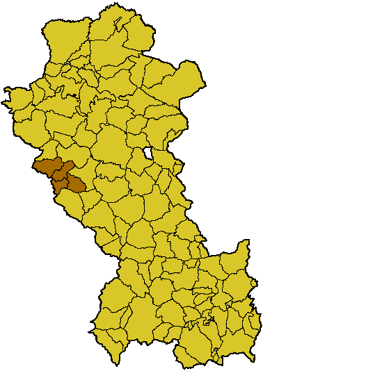 Diocesi Satriano di Lucania - PZ